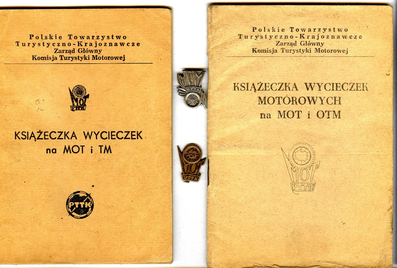 Książeczki wycieczek motorowych PTTK: z lewej wzór z 1959 r., po prawej wzór z 1971 r. Pomiędzy książeczkami odznaki: srebrna OTM (u góry) i brązowa MOT (na dole).